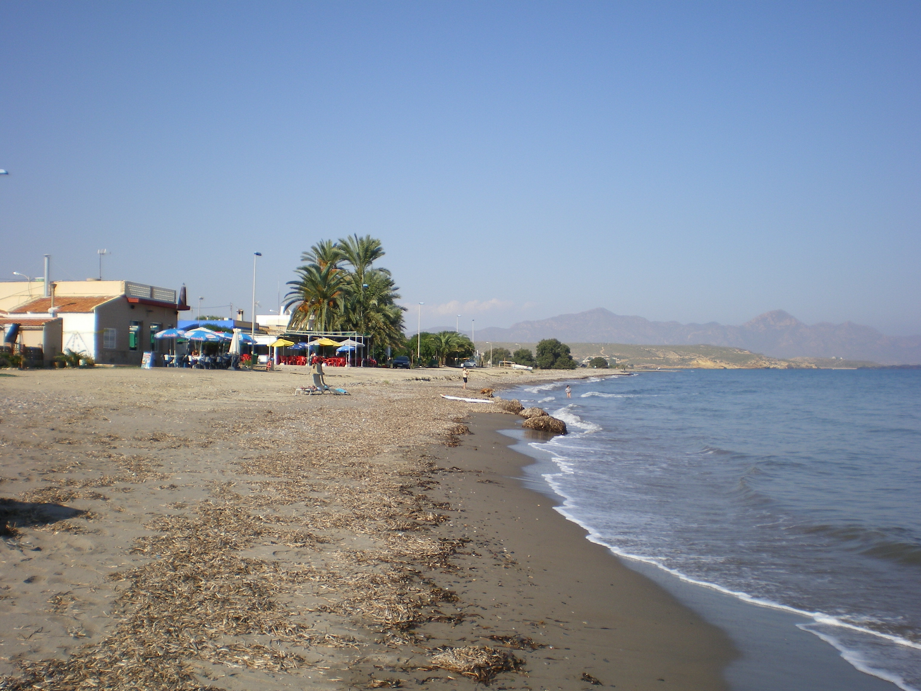 Playa de Puntas de Calnegre, dentro del término de Lorca y formando parte de la desembocadura de la rambla de Ramonete.